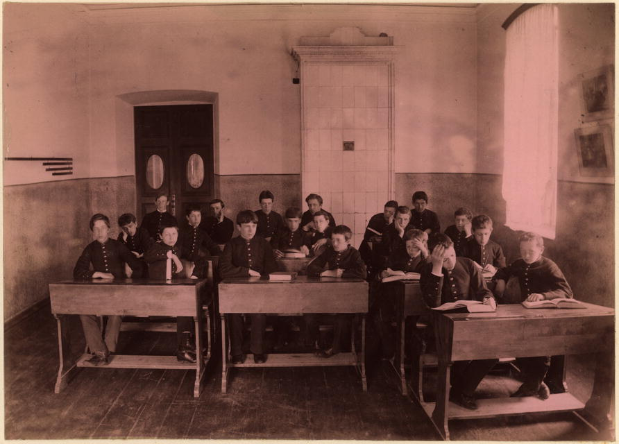 La klaso de Tjumenja Aleksandra reallernejo. Tjumenj.